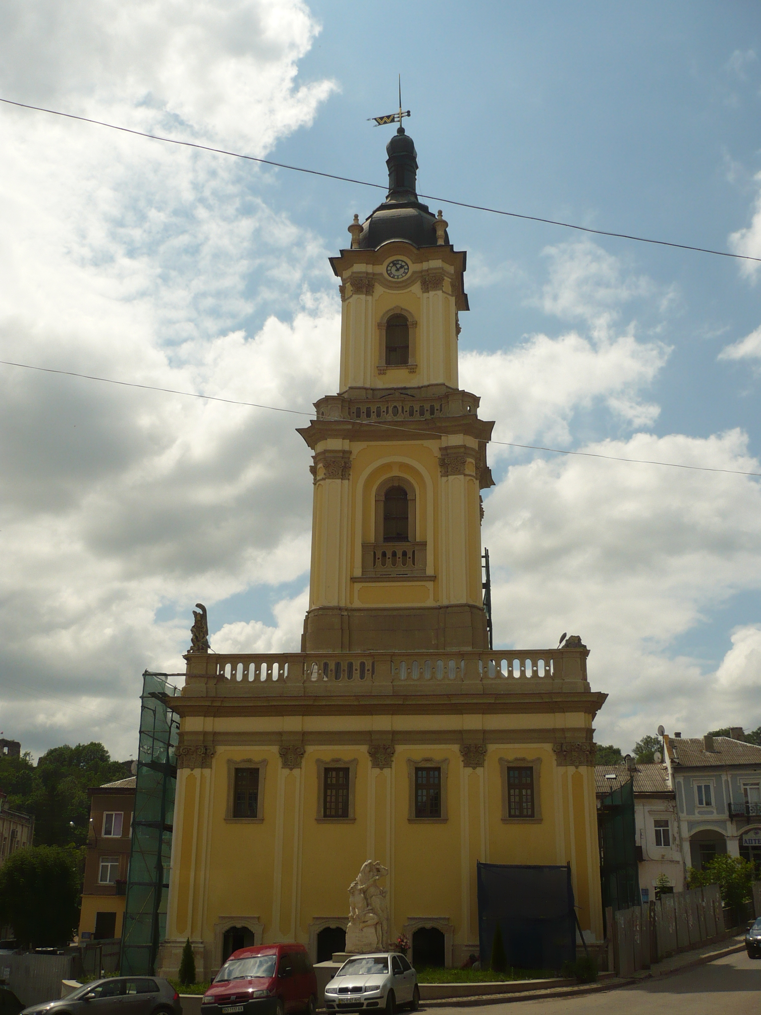 Buczacz.Ratusz